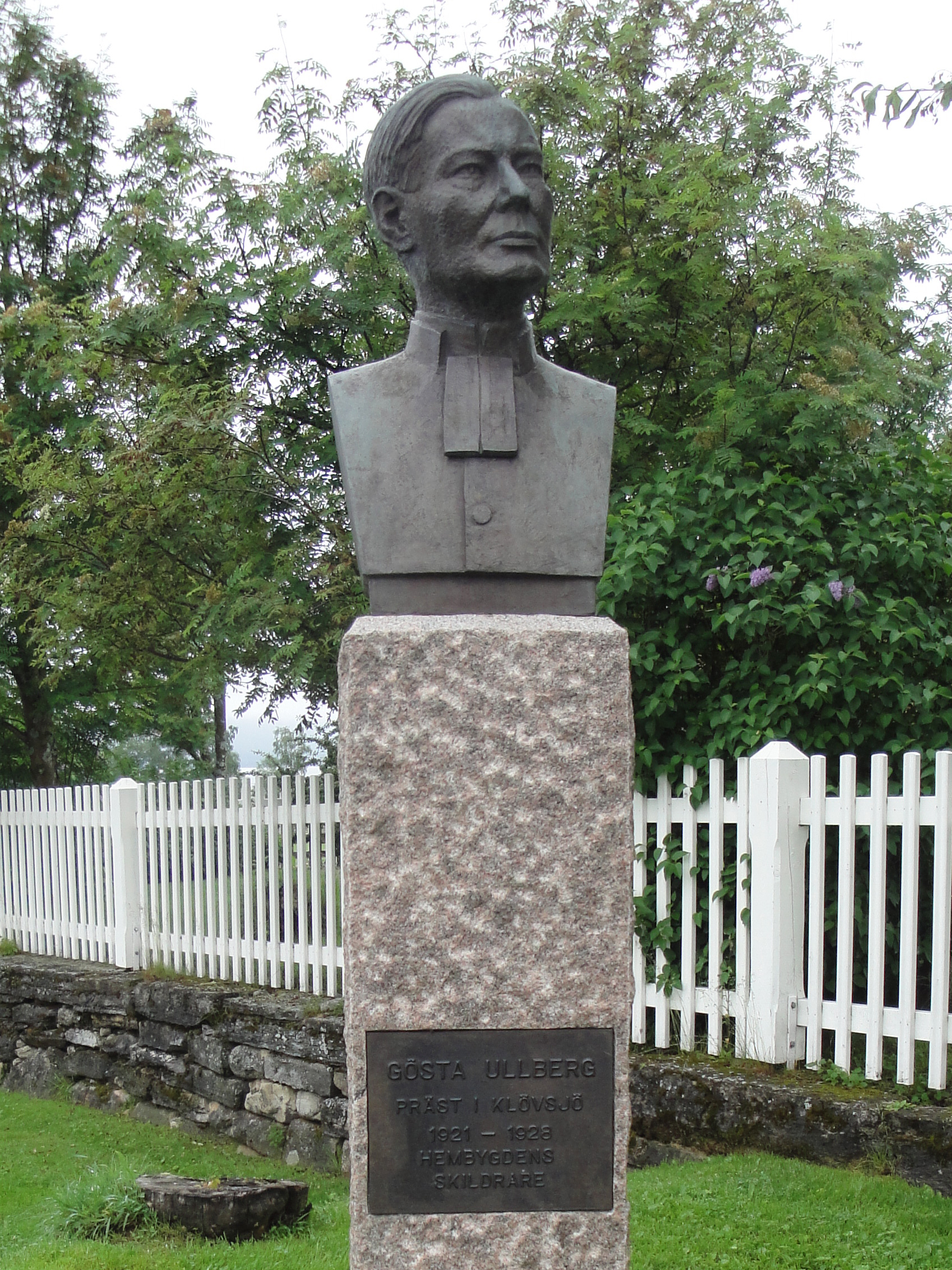 "Gösta Ullberg Präst i Klövsjö 1921-1928 Hembygdens skildrare" Byst föreställande Kontraktsprost Gösta Ullberg av Per Nilsson-Öst, 1968. Belägen vid Klövsjö kyrkas grind. Uppladdad med tillstånd av fotografen.